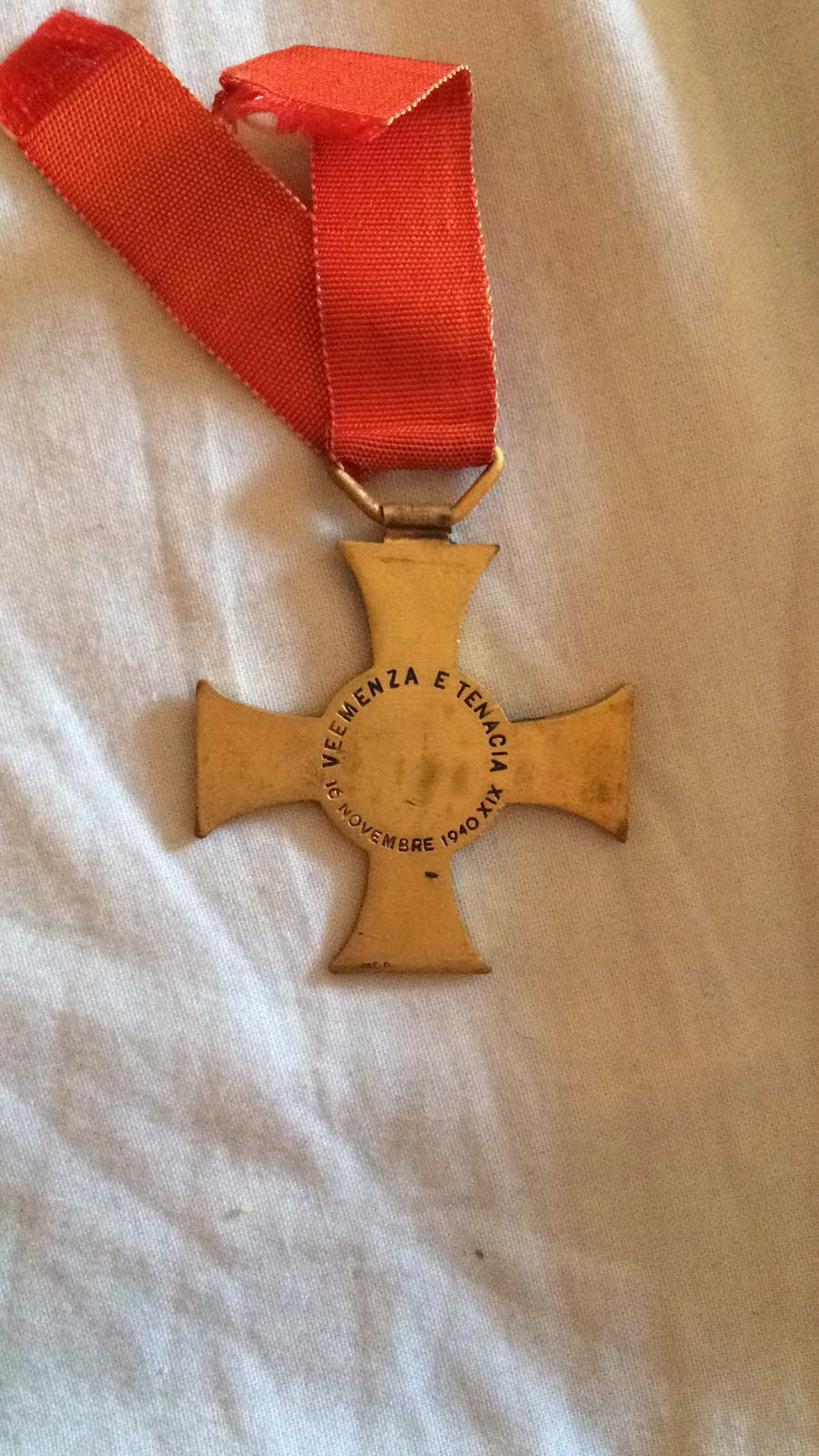 retro della Croce Commemorativa dell'11° Armata